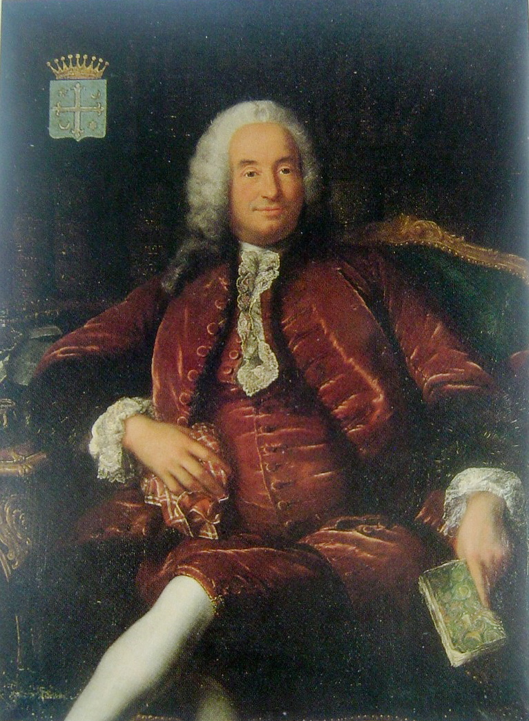 Portrait d'André Haudry (1688-1769), fermier général